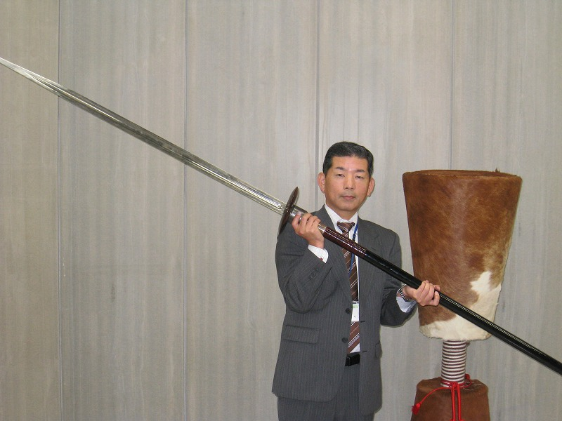 「御手杵」の槍のレプリカ。結城市当局の特別許可を受け、結城市立図書館にて。